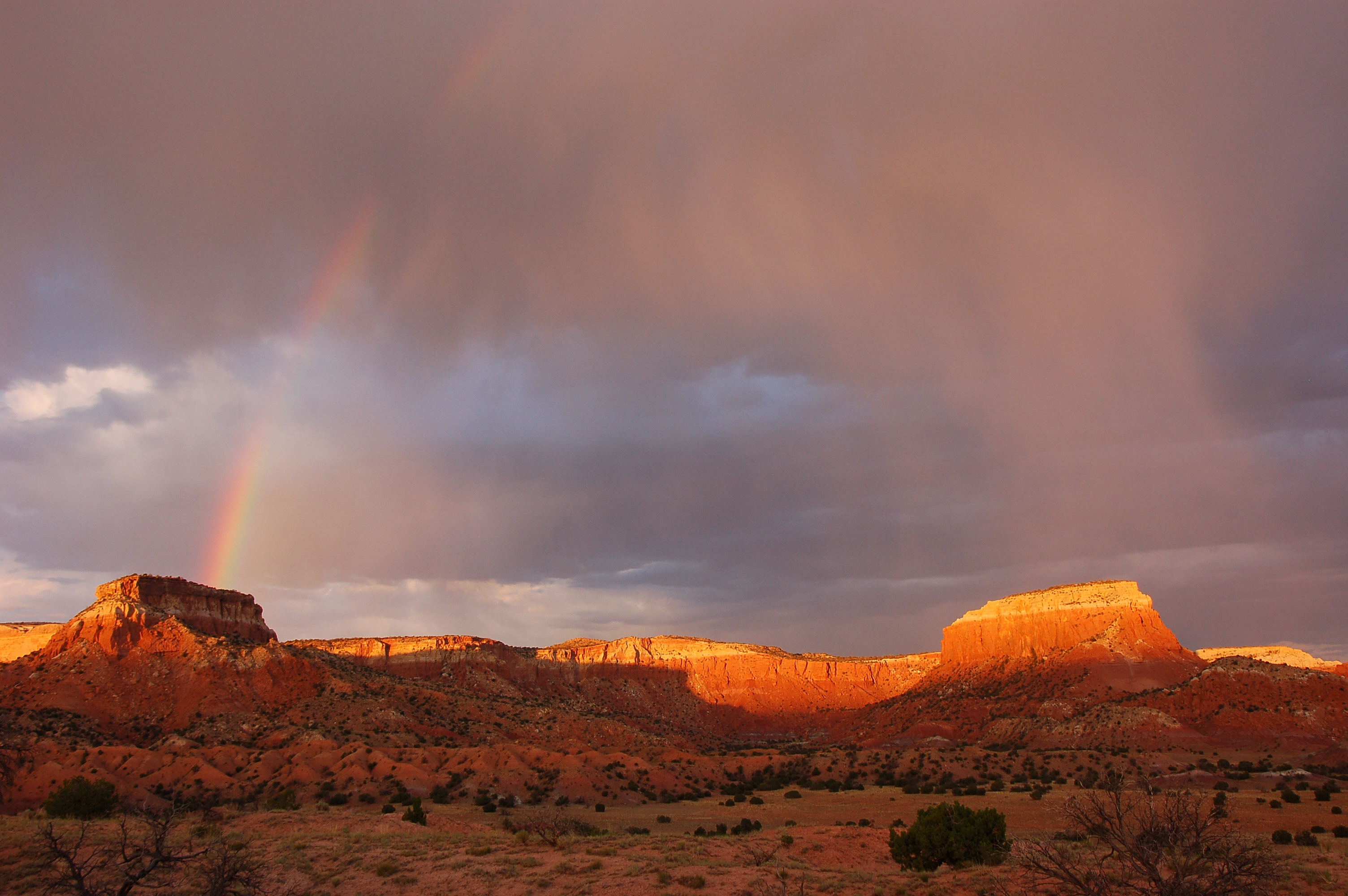 Abiquiu, NM